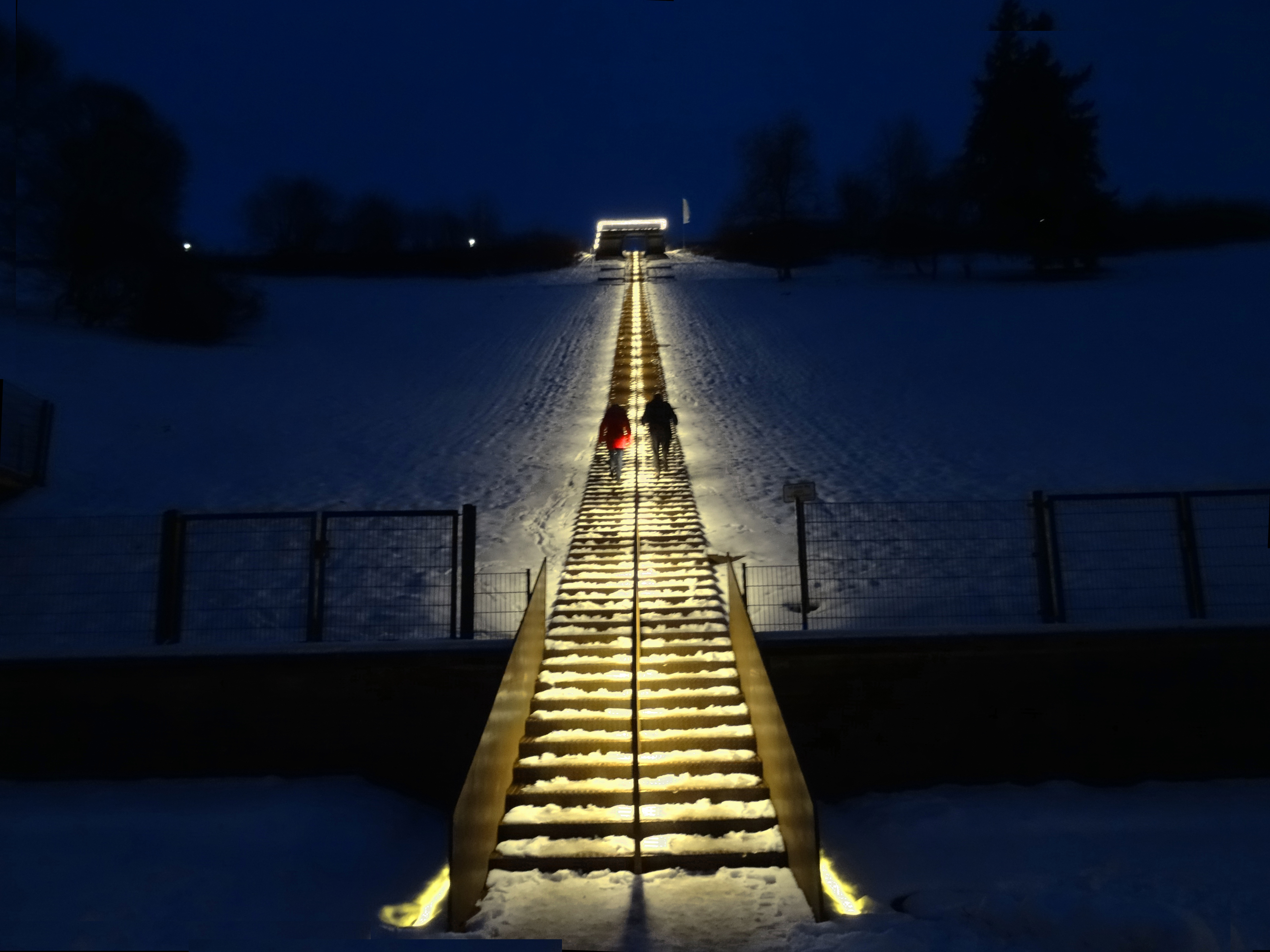 Die Himmelstreppe am Hennedamm.